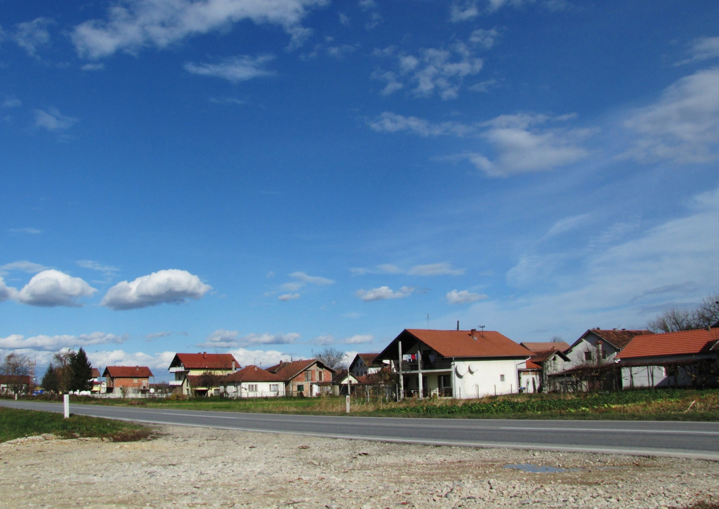 Чивчије Буковичке